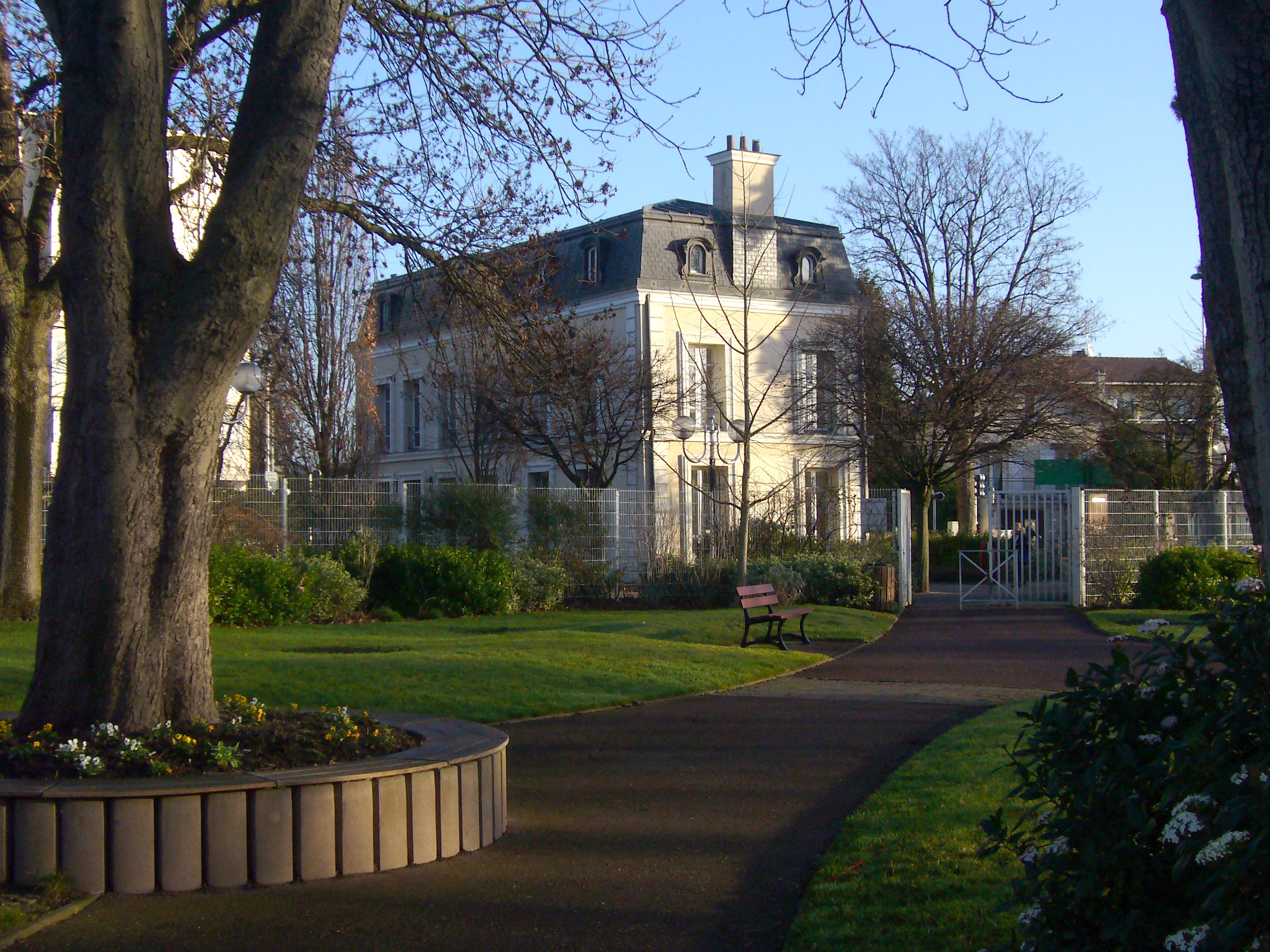 Demeure Gainville à Aulnay-sous-Bois (Seine-Saint-Denis, France) / Gainville's house in Aulnay-sous-Bois (Seine-Saint-Denis, France)